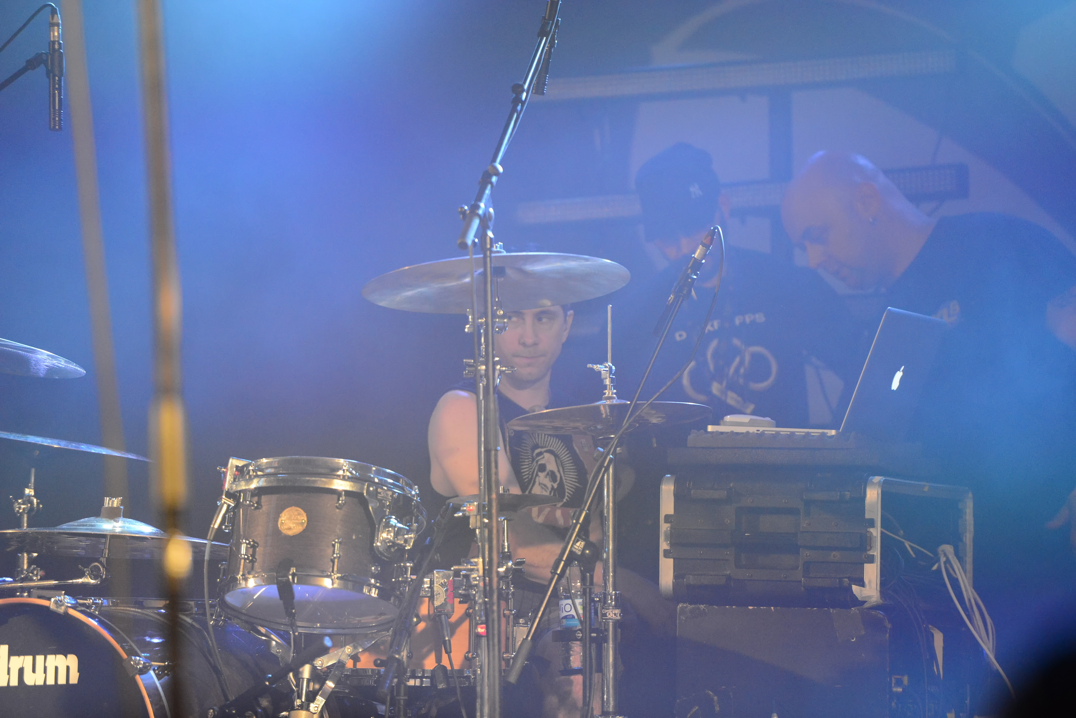 Die Krupps, Amphi festival 2014